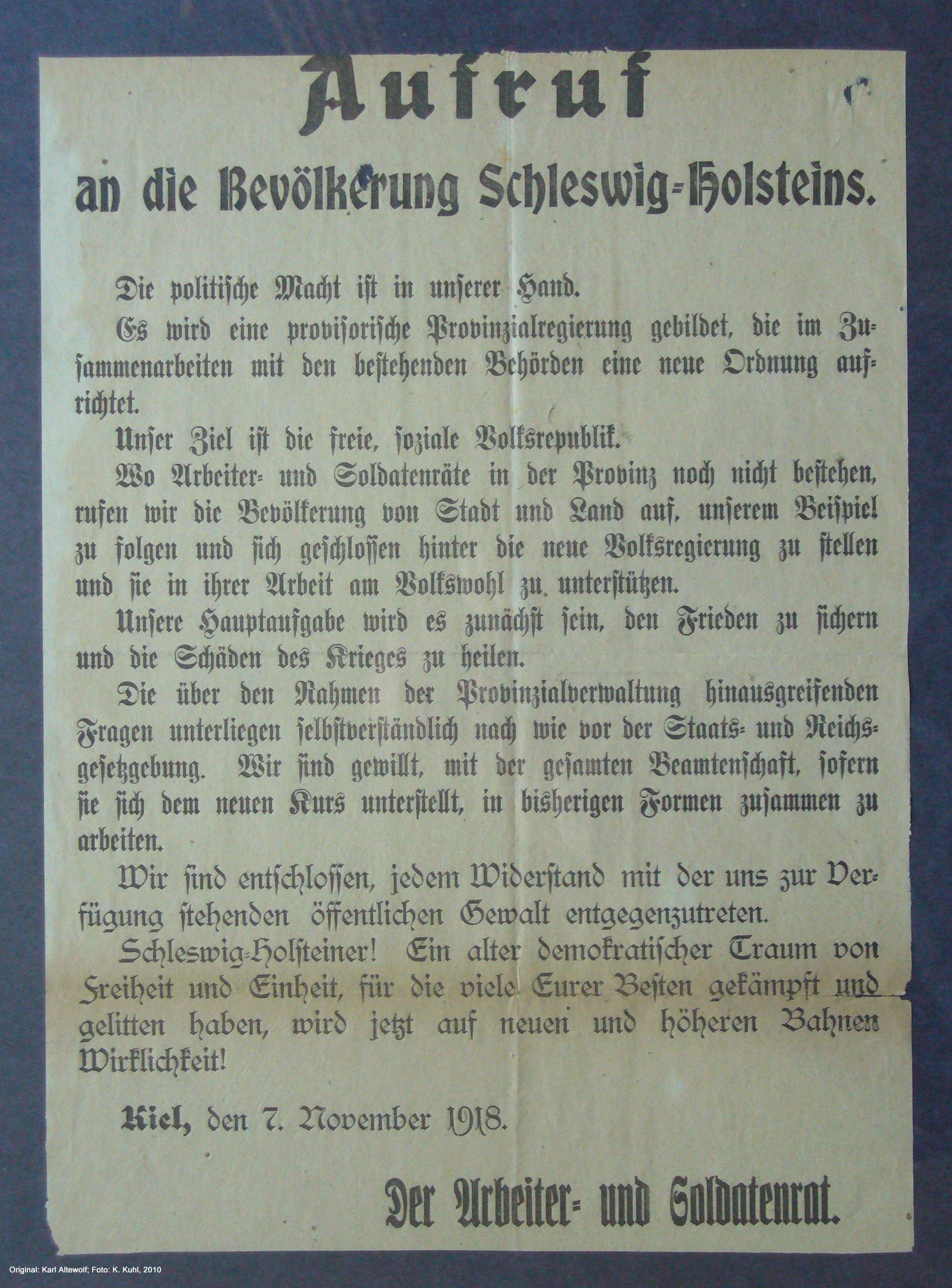 Aufruf des Kieler Arbeiter- und Soldatenrates an die Schleswig-Holsteinische Bevölkerung